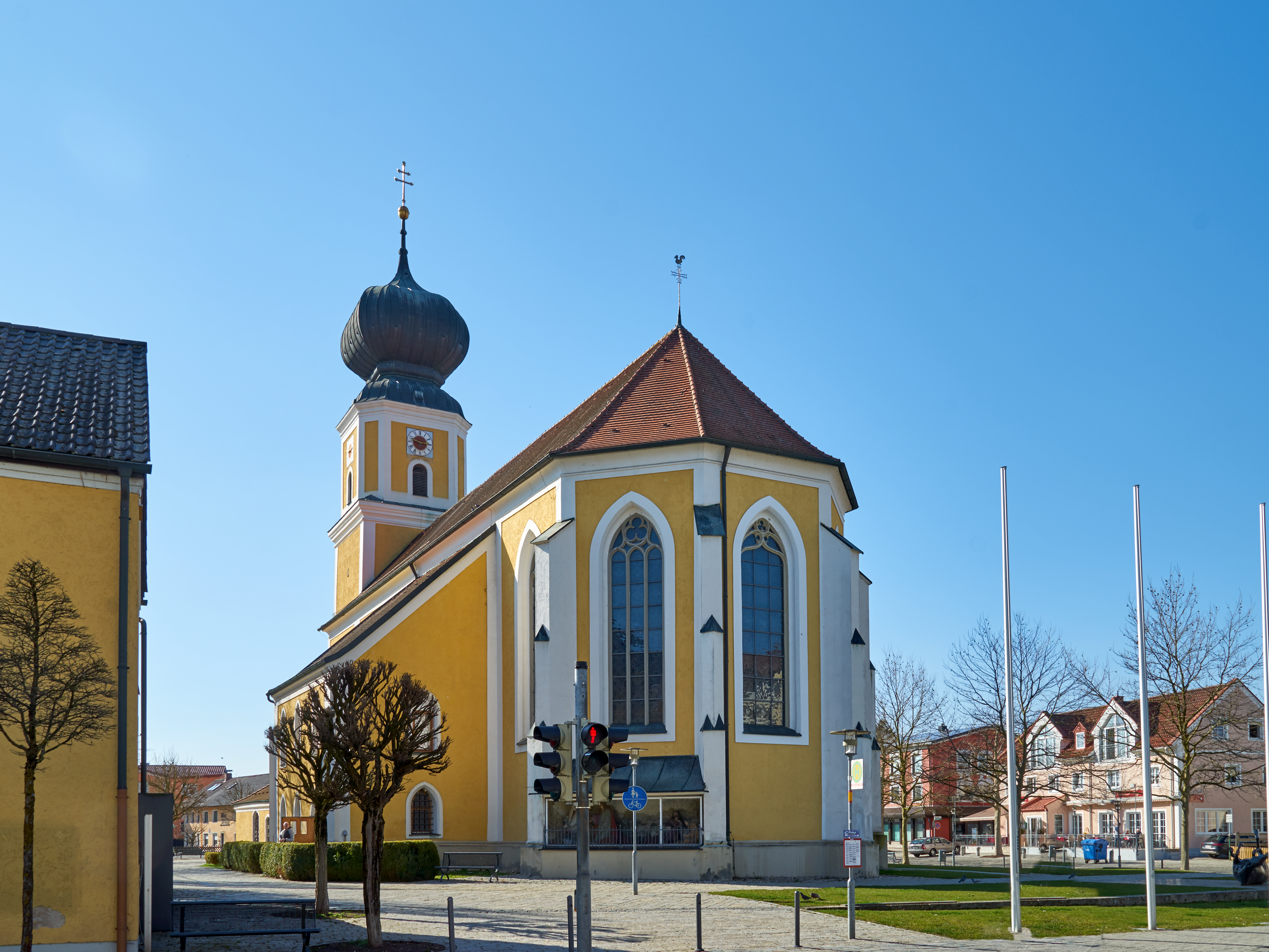 Katholische Pfarrkirche St. Ulrich, Saalkirche mit Polygonalchor, Westturm, Vorzeichen und Putzgliederungen, Chor bezeichnet 1491, Ausbau des Langhauses 1758/59, Westturm nach Brand 1724-25 erneuert.